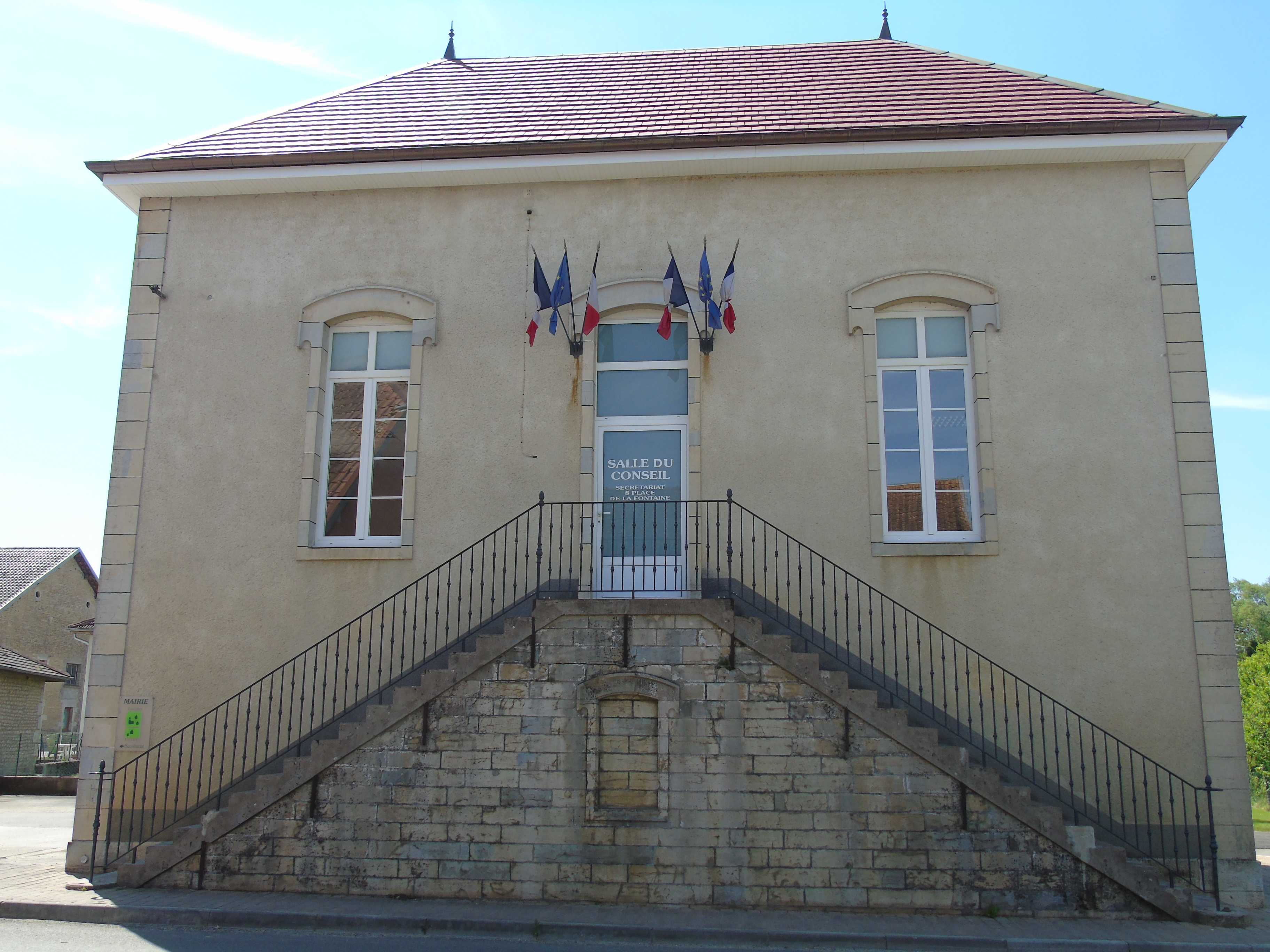 Mairie, Pouligney-Lusans, Doubs, France